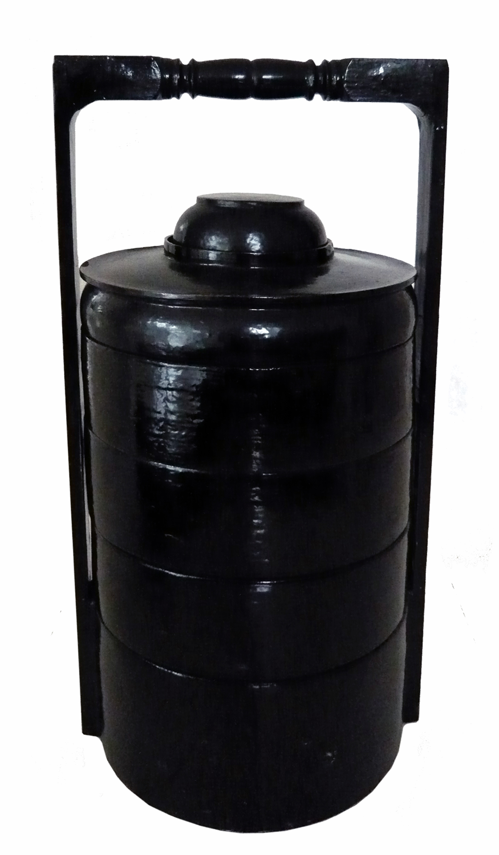 Tiffin Carrier Lack, Sammlung Gunther Lambert